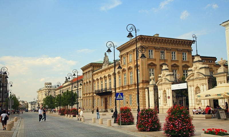 Warszawa (Polska)